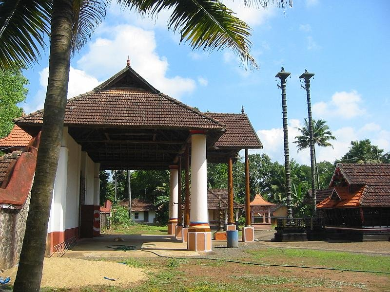 വെന്നിമല ക്ഷേത്രം